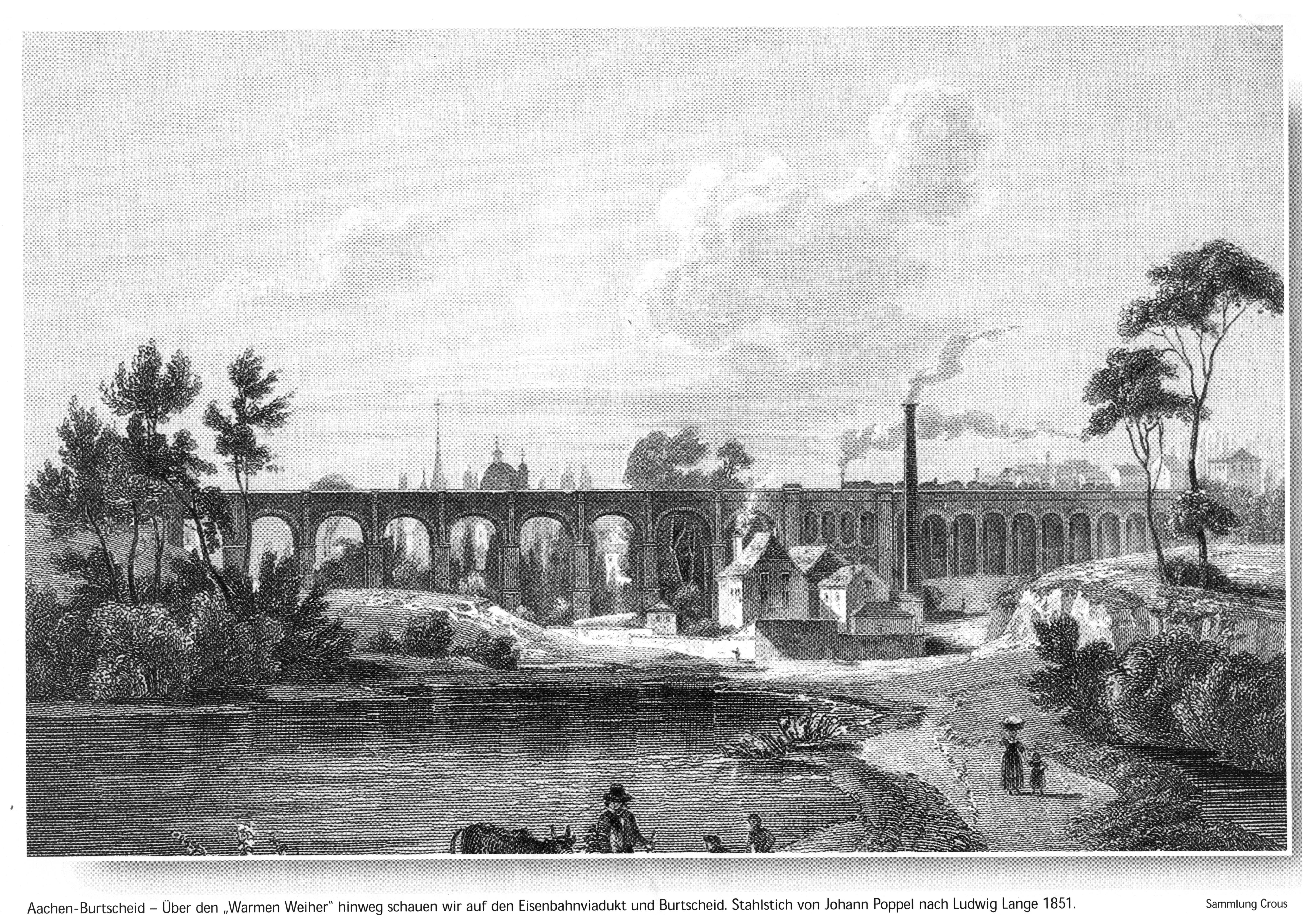 Scan: Altes Foto von einen Stahlstich Bildunterschrift: Aachen-Burtschied: Über den "Warmen Weiher" schauen wir auf Eisenbahnviadukt und Burtscheid. Stahlstich von Johann Poppel nach Ludwig Lange 1851.